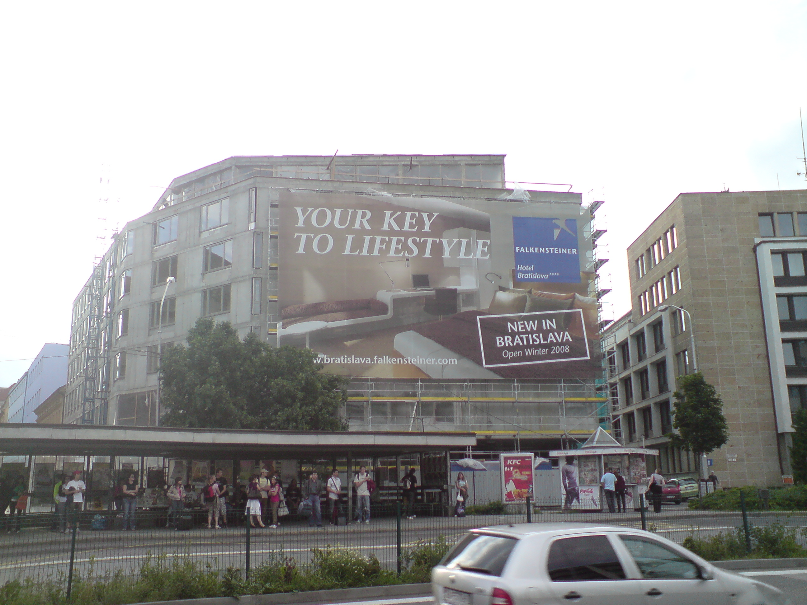 Hotel Falkensteiner in Bratislava